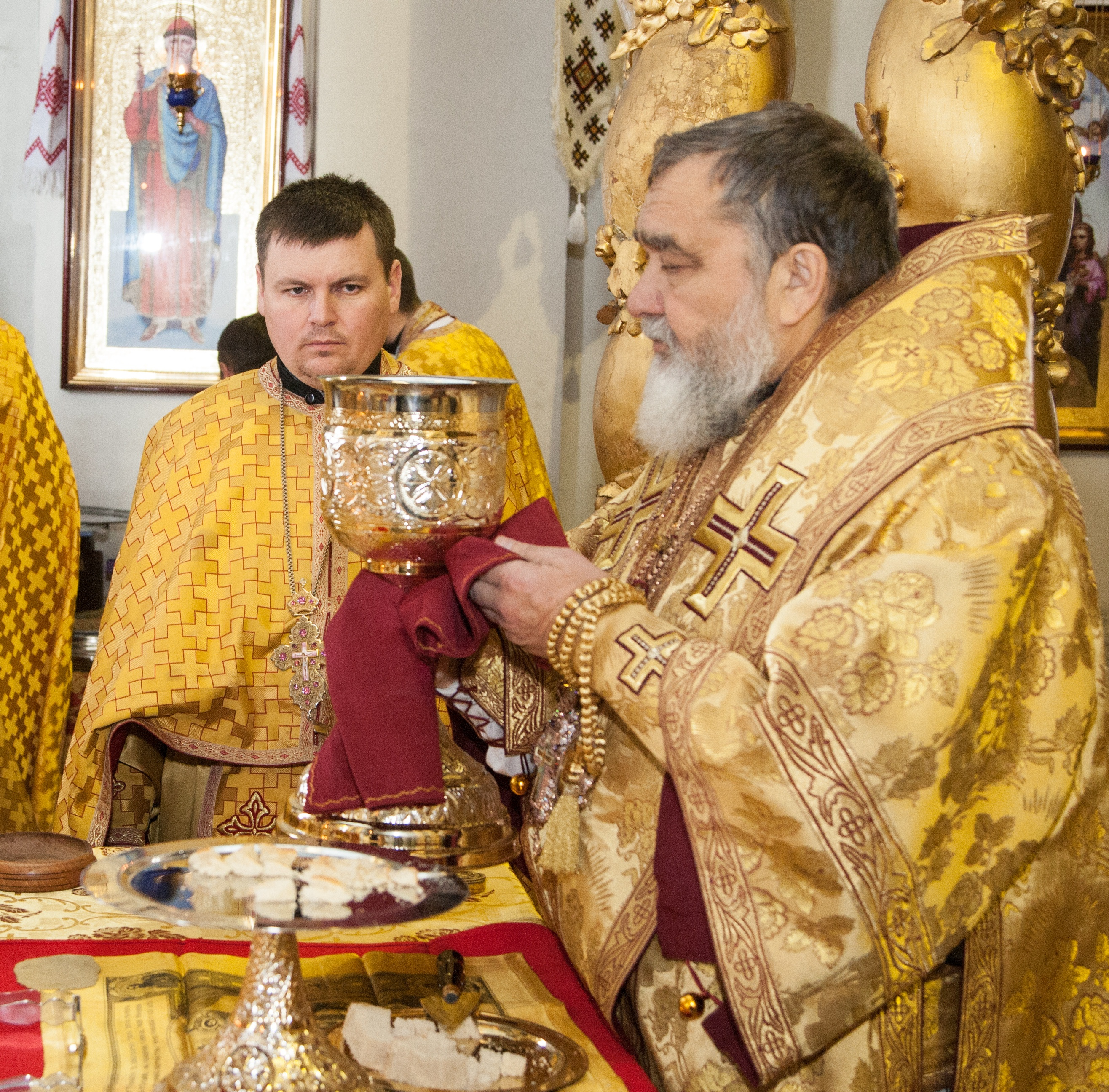 Митрополит Мефодій і його душерозпорядник Роман Будзинський у вівтарі Андріївської церкви в Києві. Спільне причастя з духовенством. Престольне свято храму, 19 листопада 2014 року